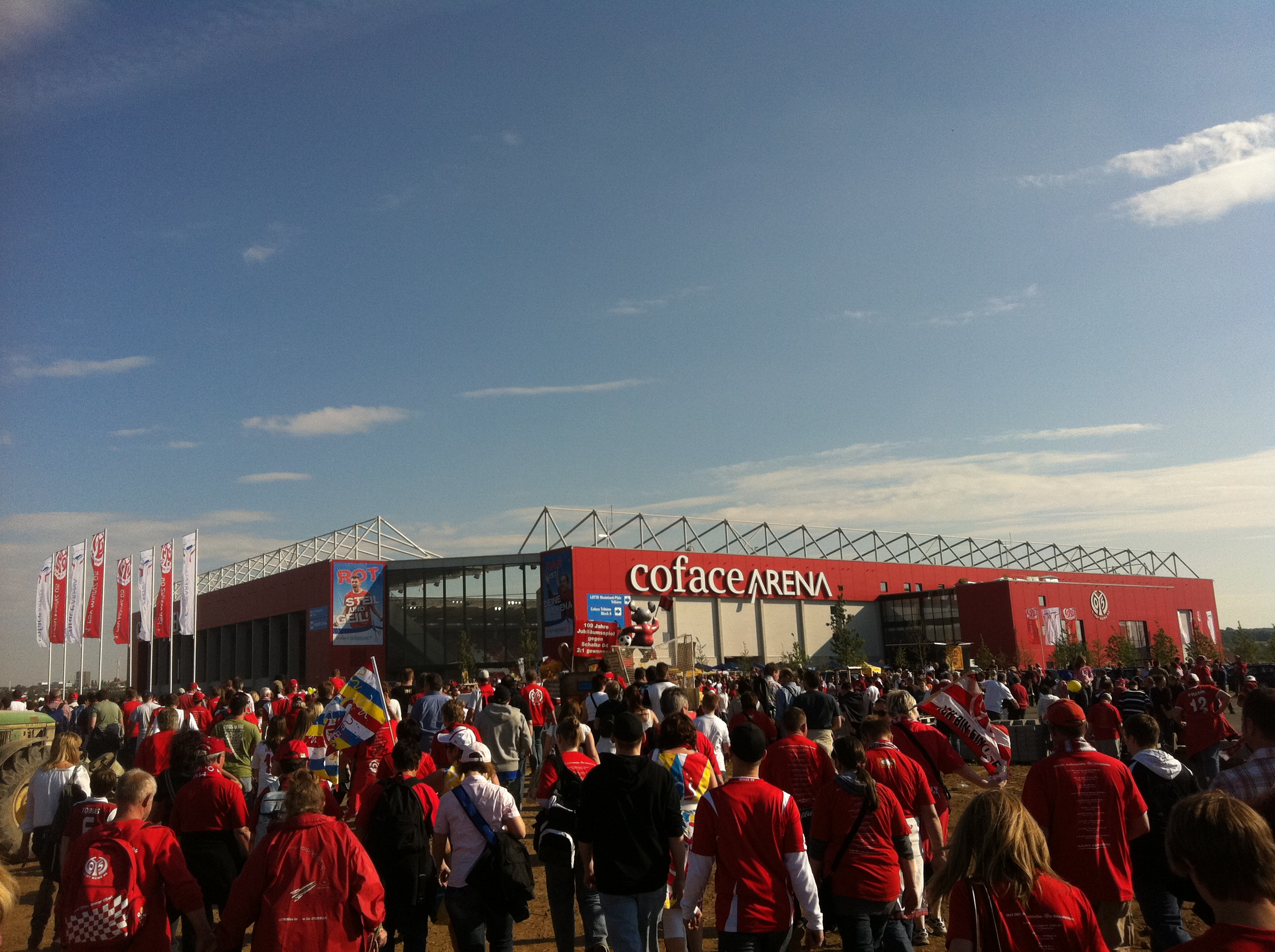 Der Weg der Fans zur Arena